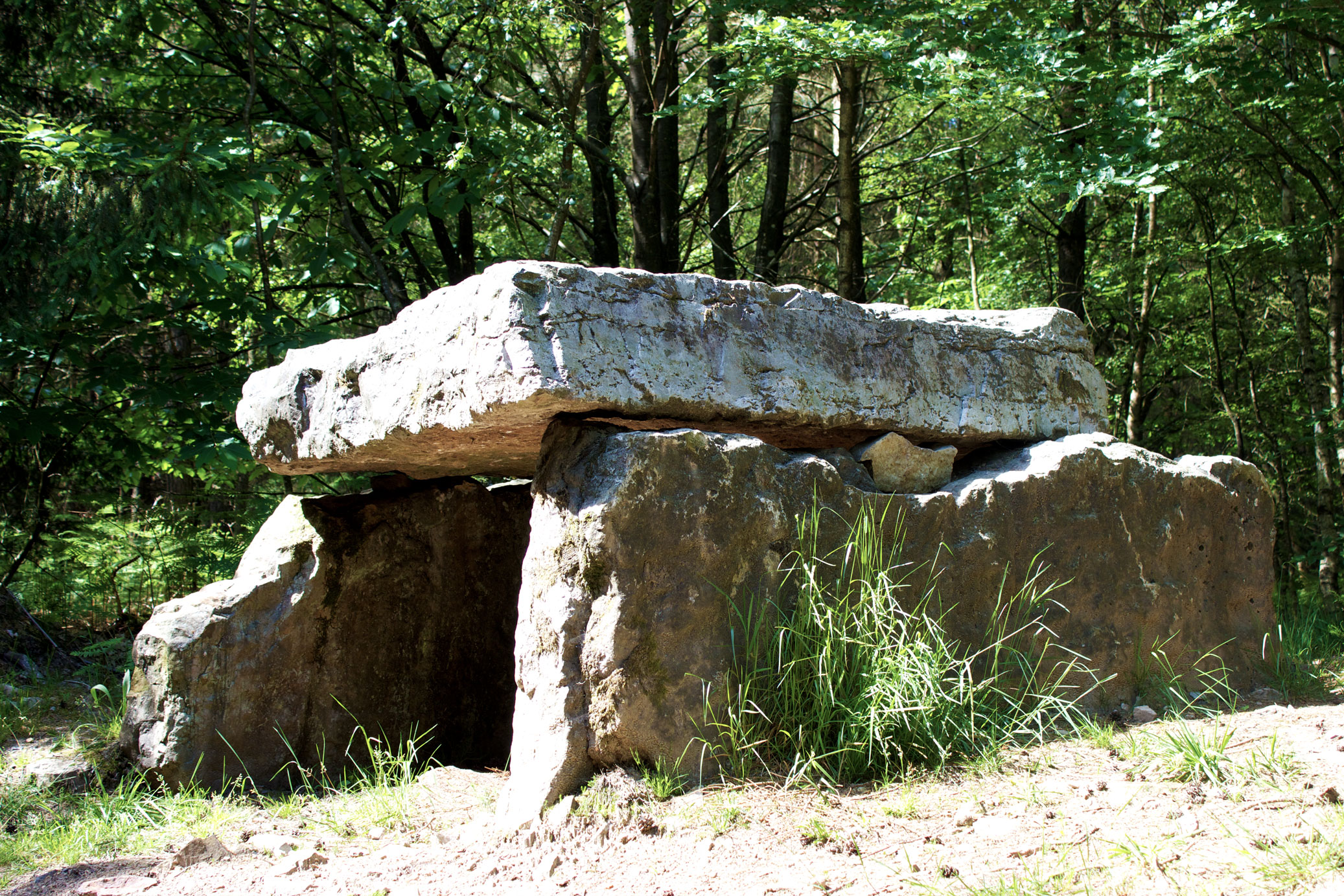 Le lit de la Gione